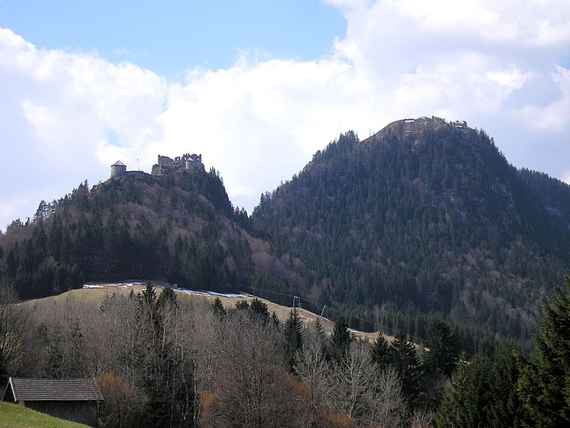 Burg Ehrenberg bei Reutte (Tirol). Burg und Festung Schloßkopf von Norden.